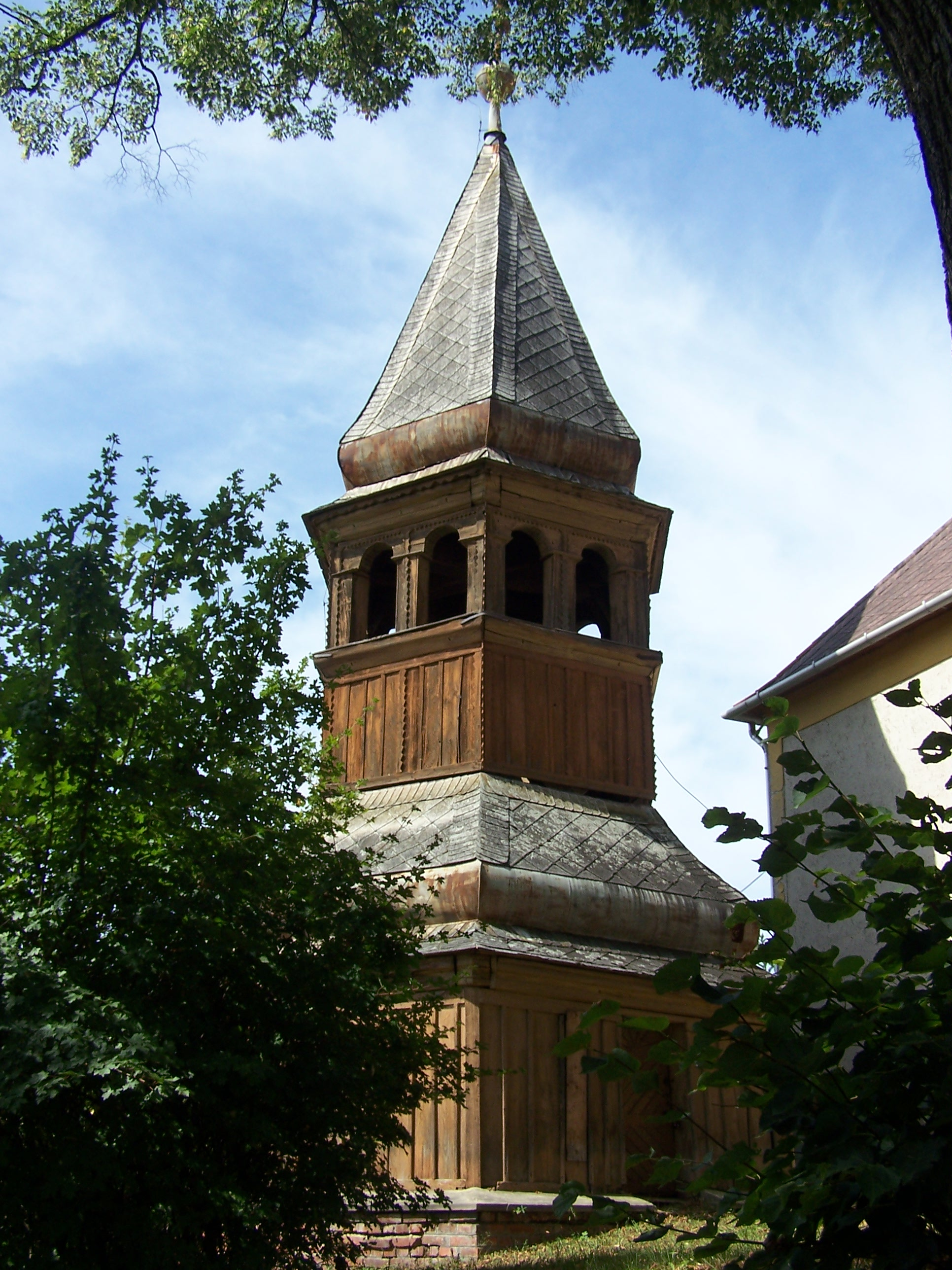 faharangláb (Radostyán, Kossuth L. u. 2.) This is a photo of a monument in Hungary, Identifier: 3046